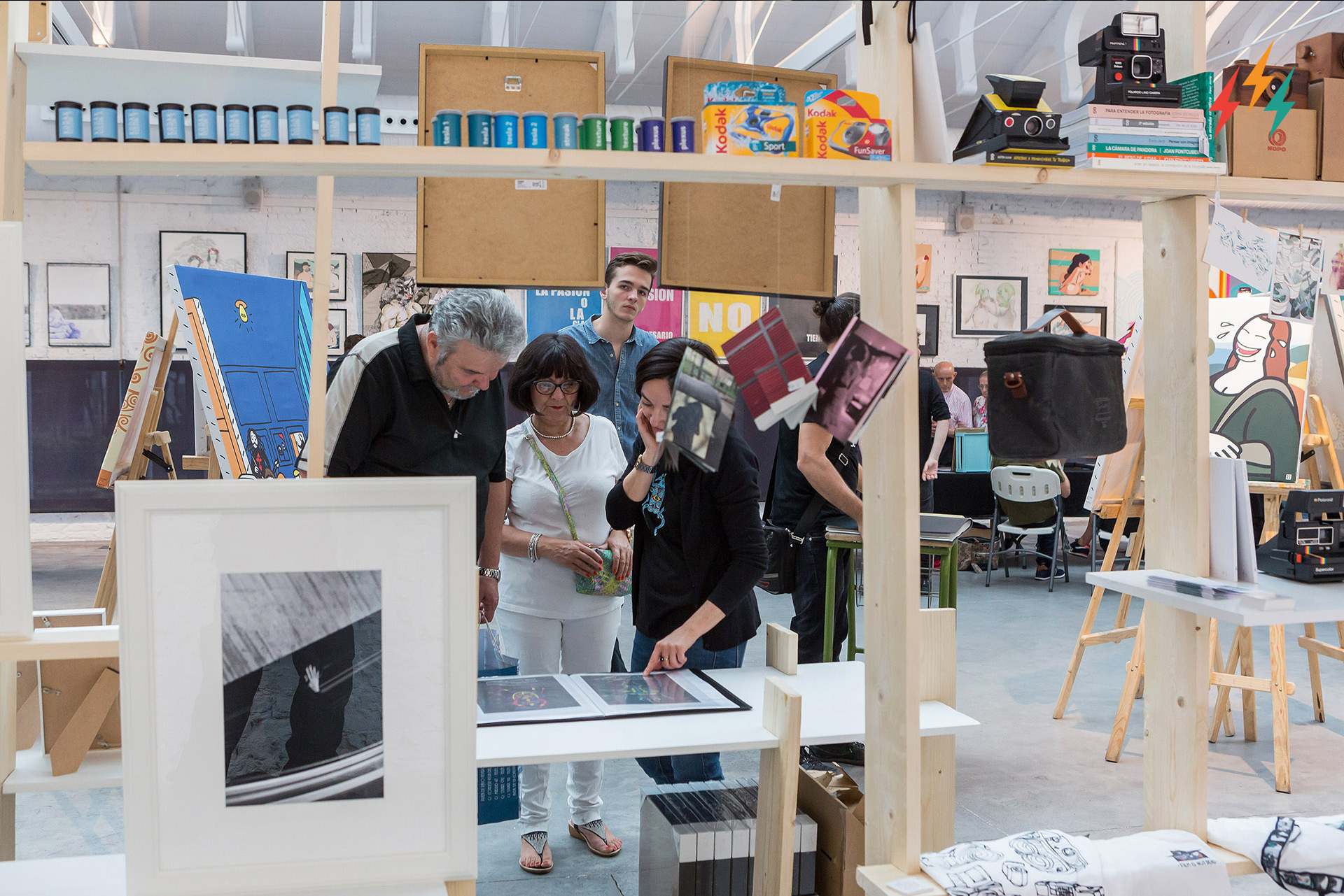 Exposición durante el Festival Cultura Inquieta